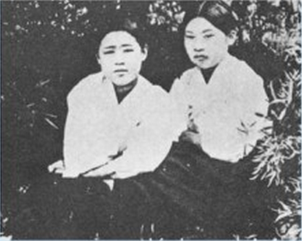 1929년 11월 광주학생항일운동 관련자들